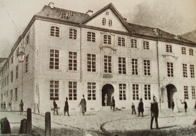 Das Bild zeigt eine Lithographie des Künstlers Robert Geissler (11,6x7,6cm). Dargestellet ist das Löwensche Palais, auch Haus der Ressource, das 1944 zerstört wurde. Dieses Foto wurde aus dem Buch "Geschichte der Stadt Stralsund" von Herbert Ewe, S. 226, abfotografiert.